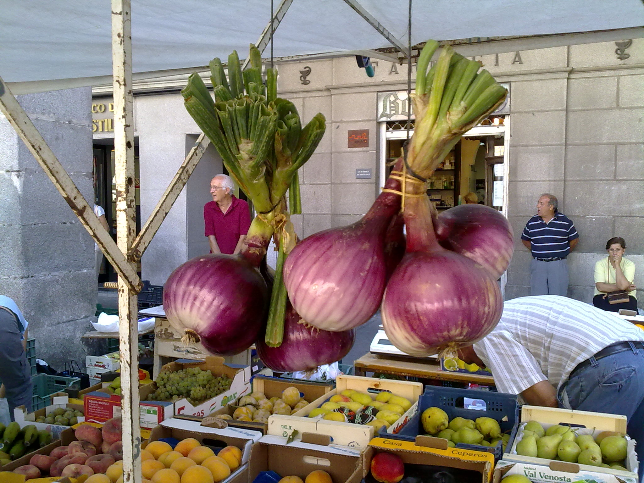 (Allium cepa). Cebollas rojas en el mercado de los viernes en Ávila, España